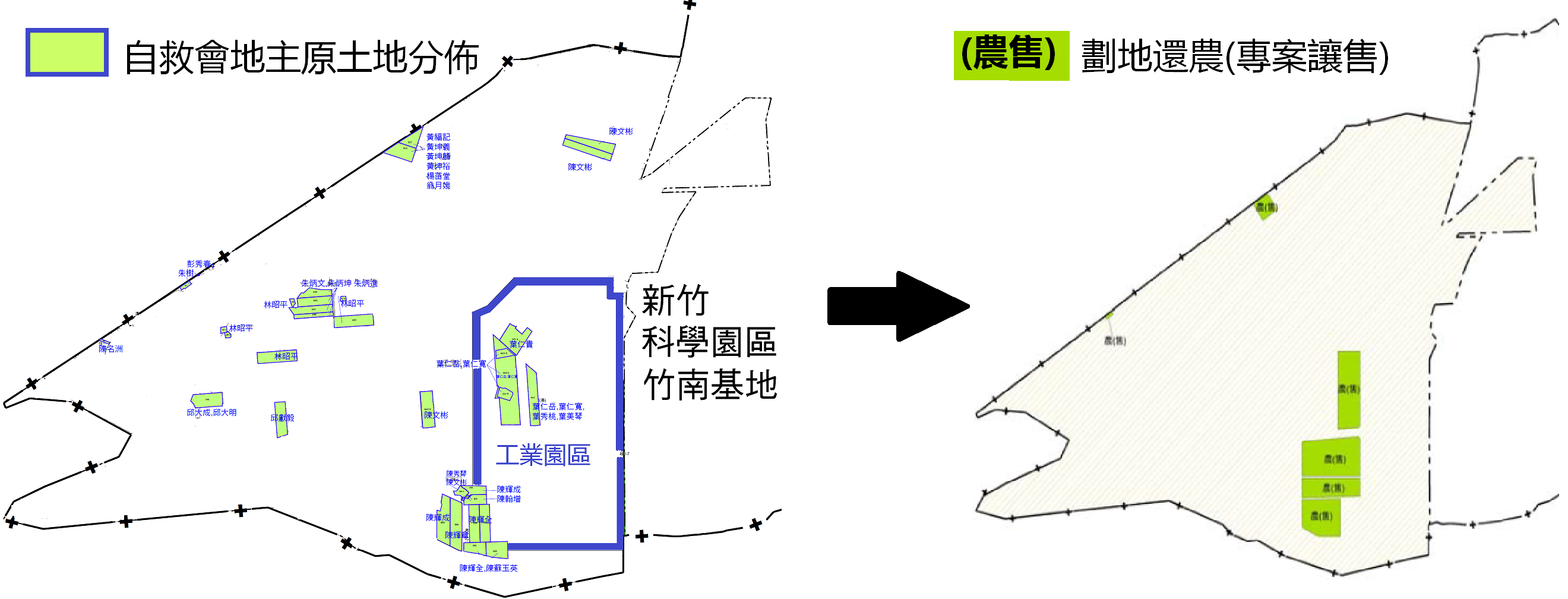 參與專案辦理讓售土地所有權人土地分佈位置示意圖及劃地還農後的位置說明